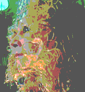 autore:Dyana